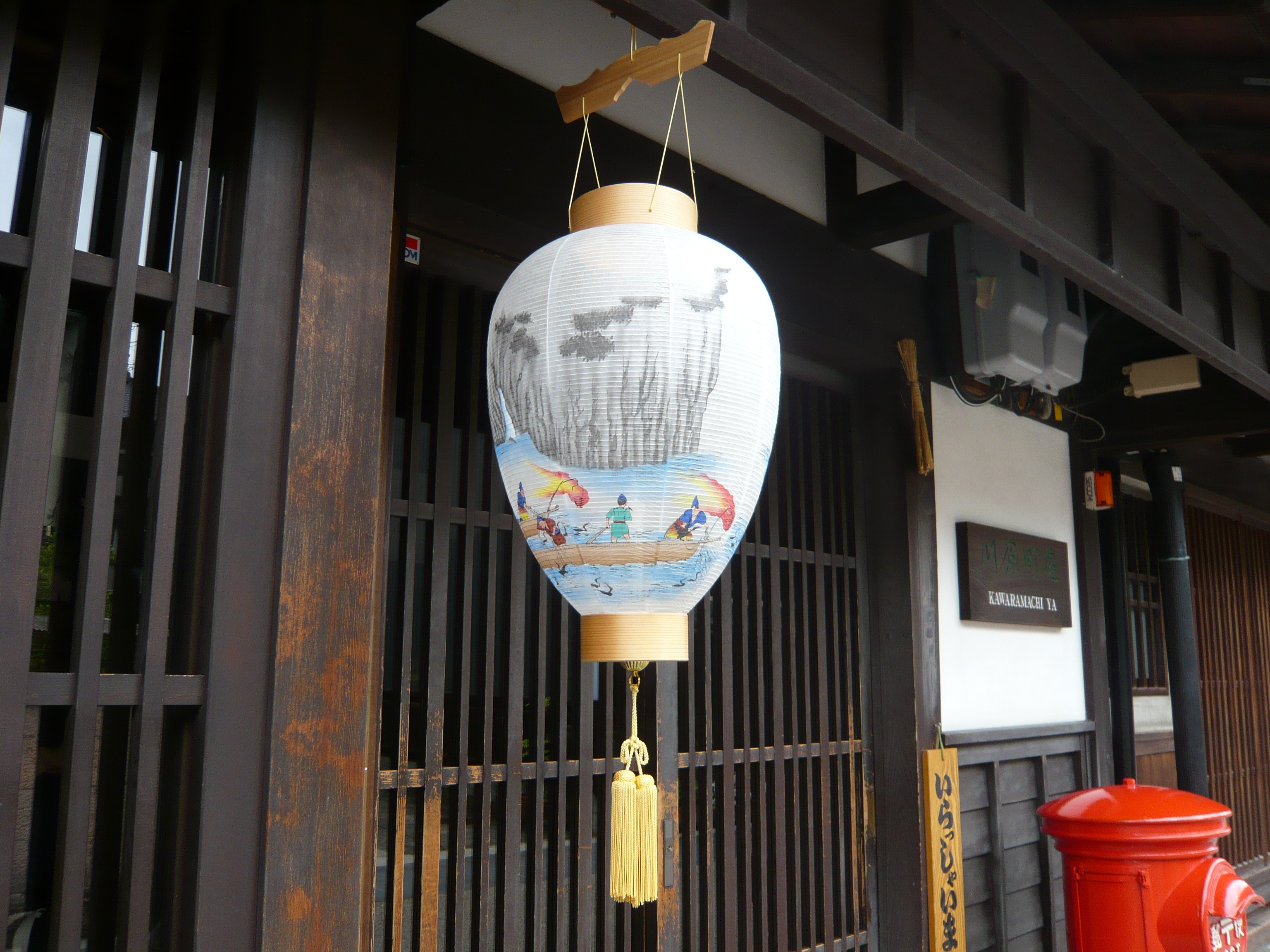 岐阜提灯。岐阜市川原町にて撮影。